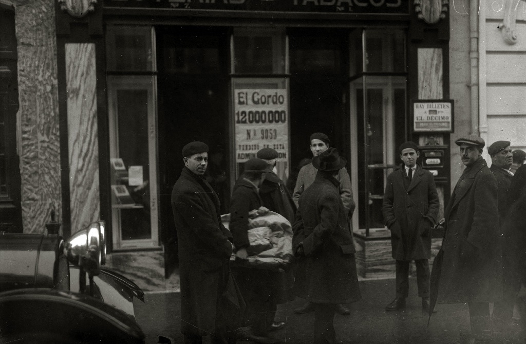 Título original: Exterior de la Administración de Tabacos y Loterías de la calle Garibai, junto al Cine Novedades (3/3) Localización: San Sebastián (Guipúzcoa)